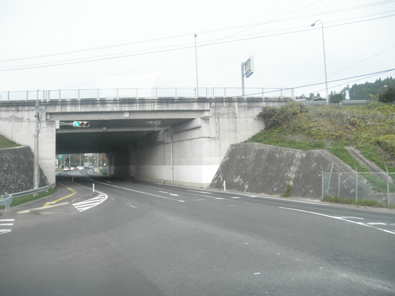 宮城県宮城郡利府町赤沼明ヶ沢 宮城県道144号赤沼松島線